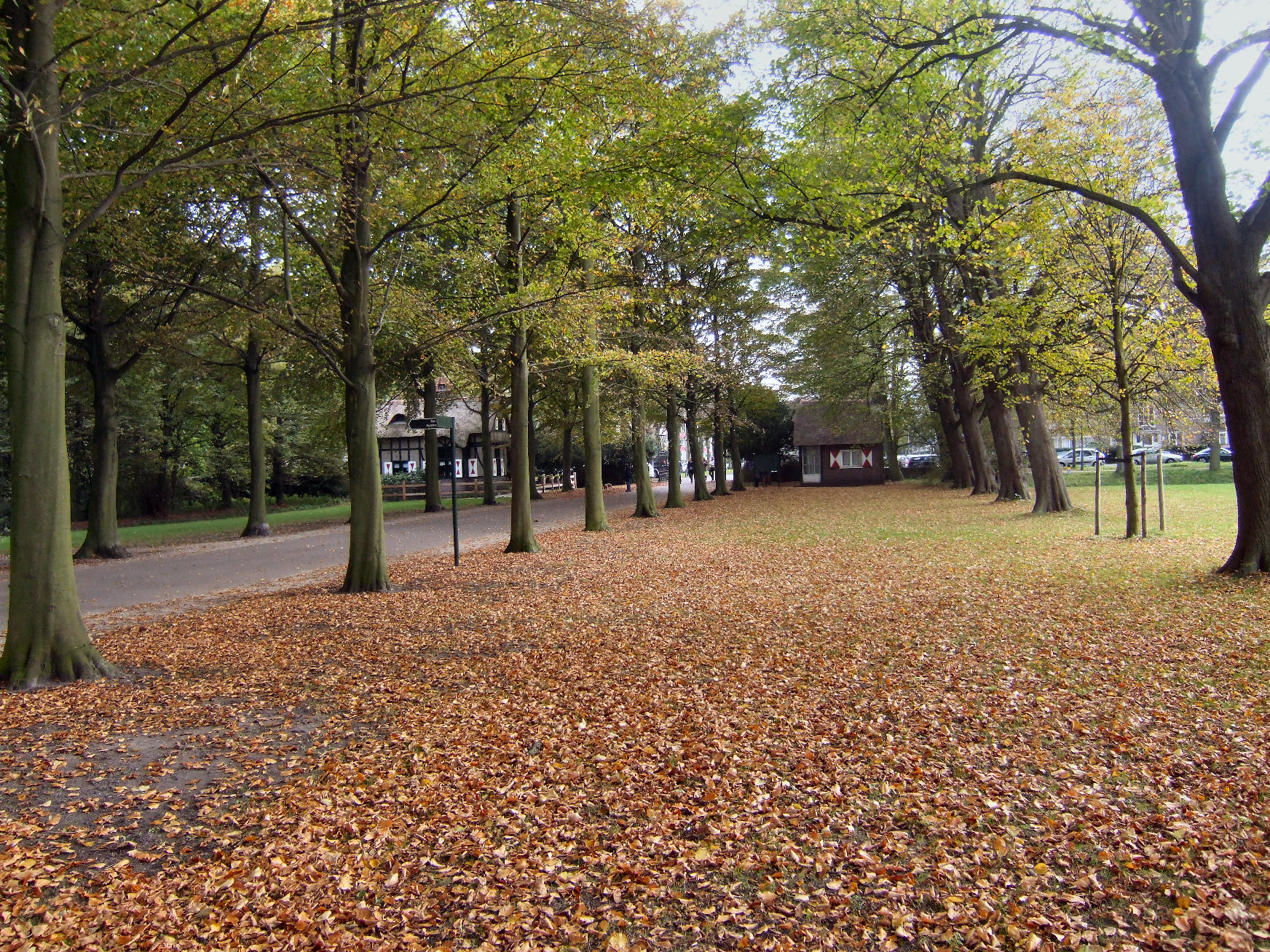 Entree landgoed Clingendael in Den Haag (The Hague)